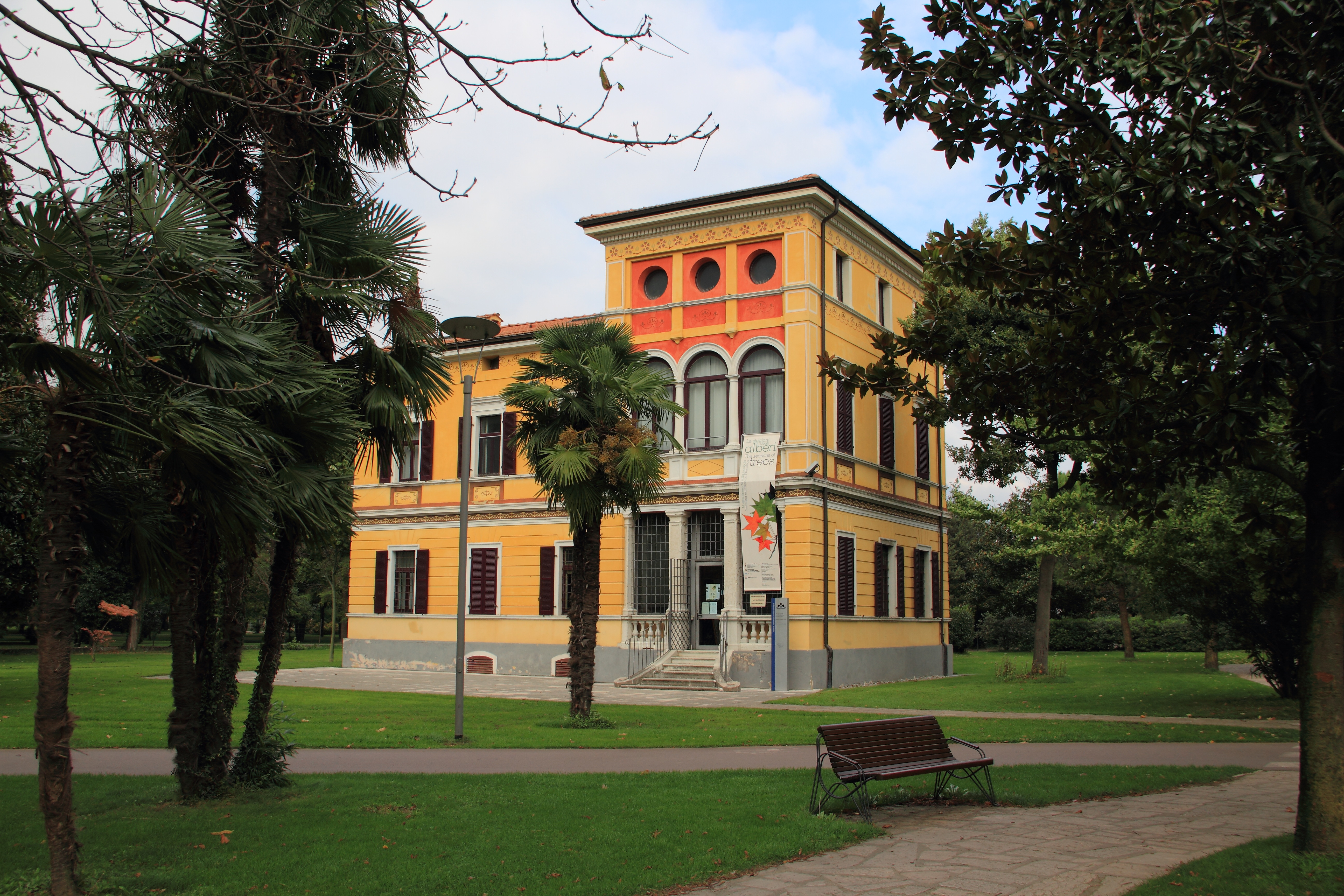 Villino Campi. Das Centro di valorizzazione scientifica del Garda in Riva.